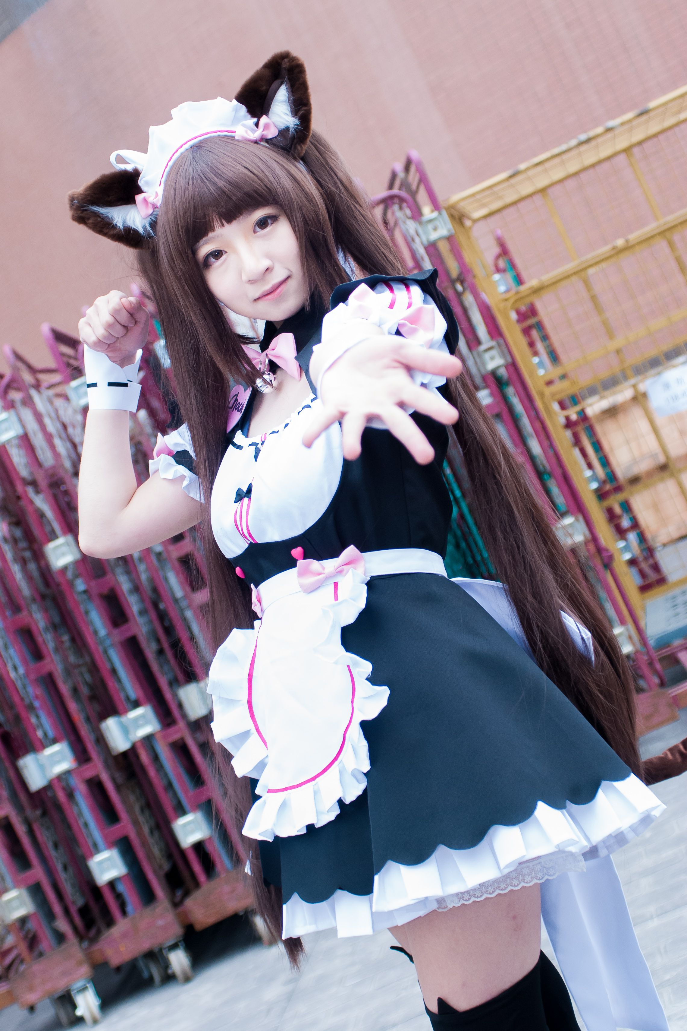 第29屆開拓動漫祭，《Nekopara》巧克力cosplayer。